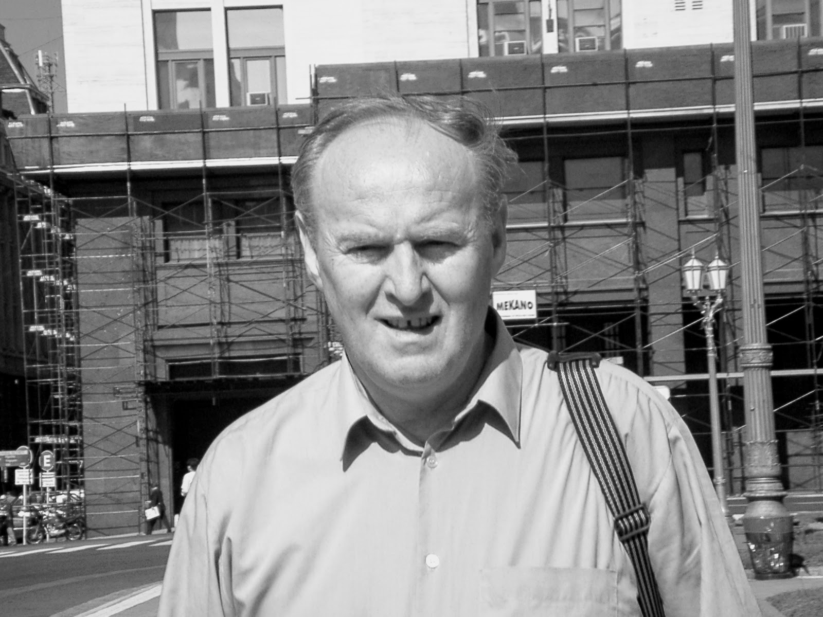 Prof. Czesław Majorek w Buenos Aires.